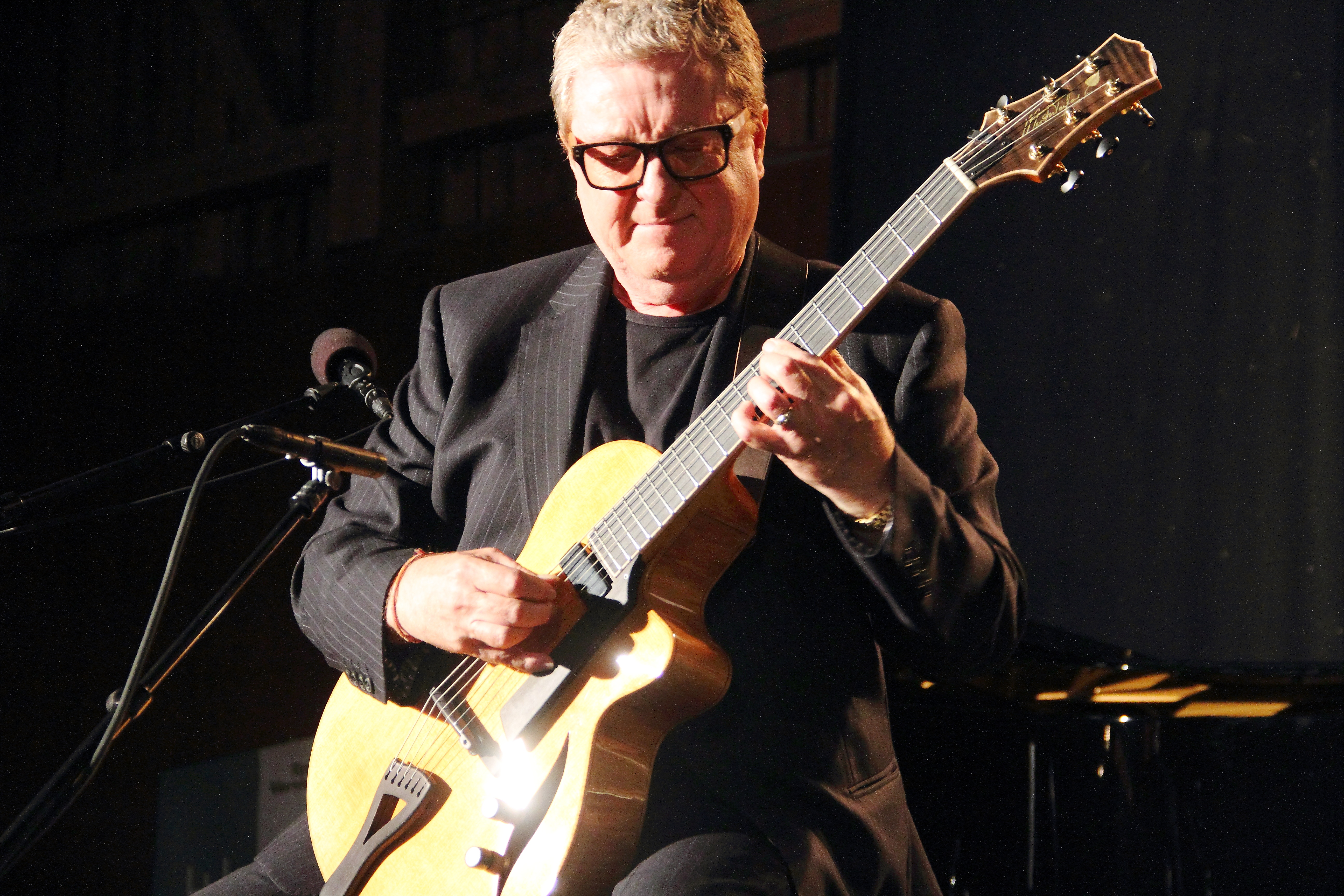 Der britische Jazzgitarrist Martin Taylor auf dem INNtöne Jazzfestival 2017.